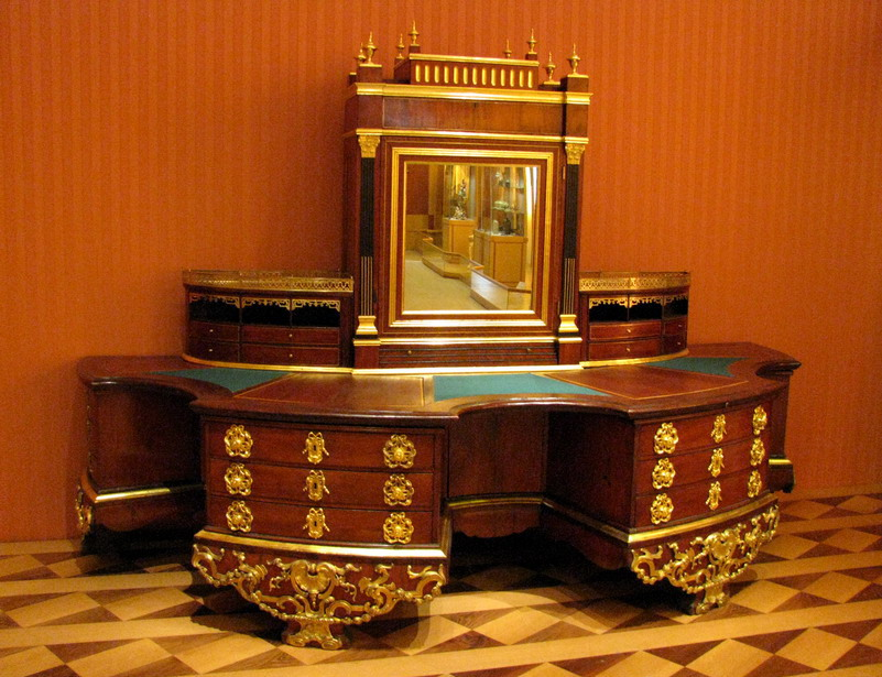 Бюро А.Ф. Турчанинова — Д.П. Соломирского, середина XVIII века. Сделано из красного дерева, инкрустировано бронзой с позолотой. Из коллекции музея УОЛЕ.